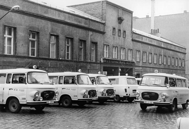 Berlin, Rettungsamt, Krankenwagen ADN-ZB Settnik 17.2.88 Berlin: Rettungsamt- Etwa eine halbe Millionen Mal im Jahr fahren Krankenwagen des Berliner Rettungsamtes vom Hof. In der Leitstelle der Schnellen Medizinischen Hilfe in der Marienburger Straße und in den fünf weiteren Stützpunkten der Hauptstadt arbeiten rund 500 technische Kräfte - darunter allein 300 Transporteure -, um die medizinische Versorgung der Bevölkerung in Nofällen zu sichern. Etwa 1.000 Ärzte aus Krankenhäusern und Polikliniken der Hauptstadt sind in den Bereitschaftsdienst einbezogen. (siehe auch 25N)